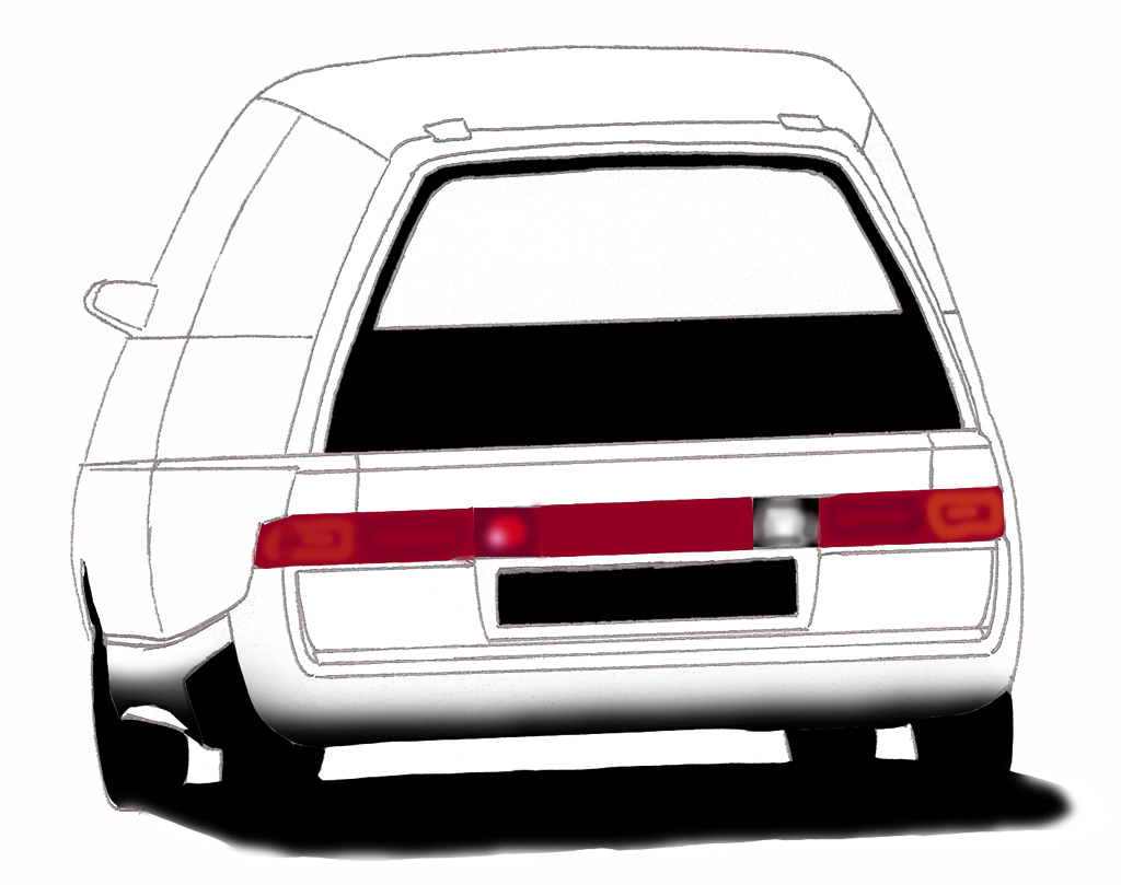 dessin personnel du prototype Renault Vesta II